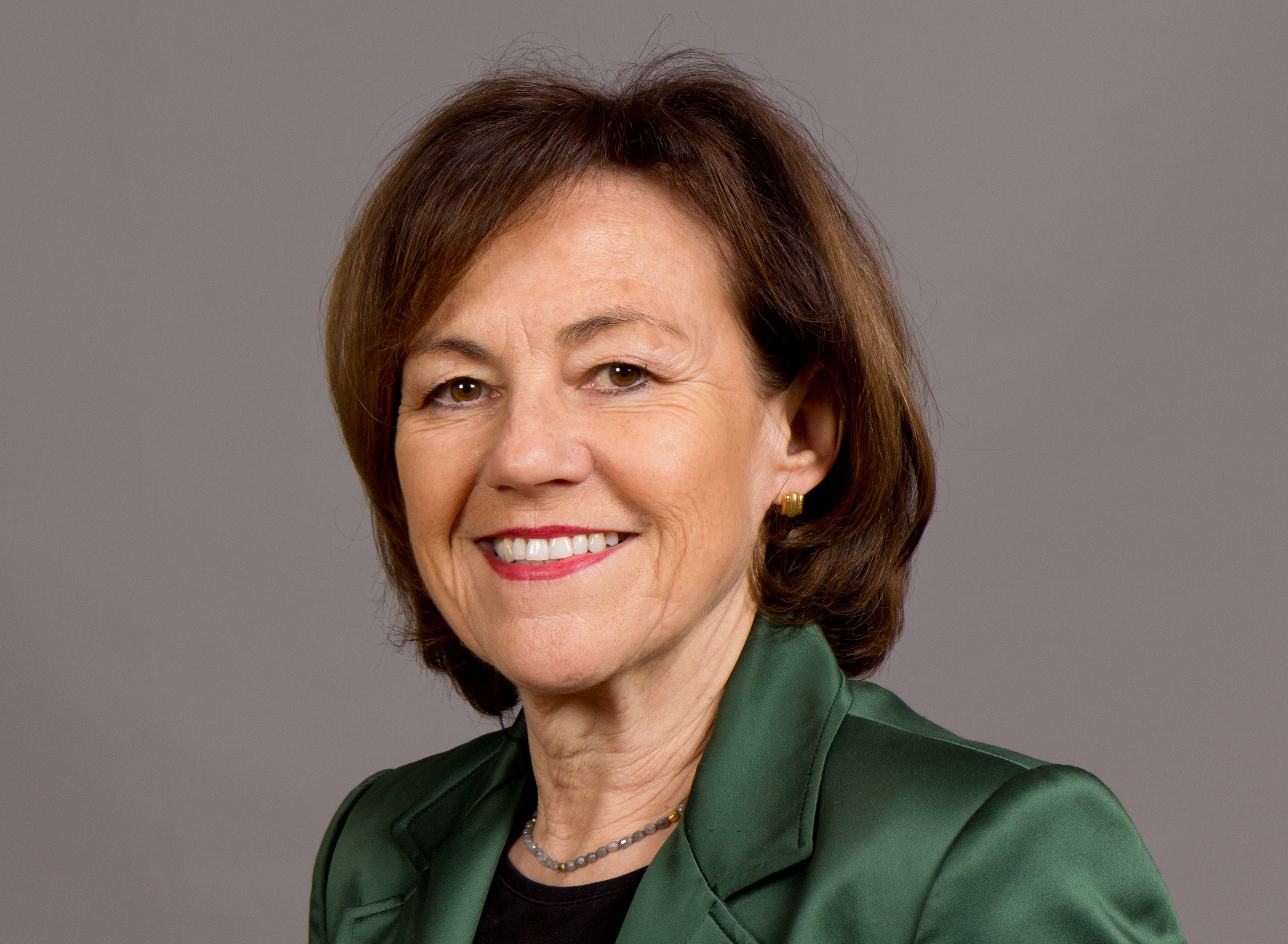 Margit Conrad (* 30. September 1952 in Kusel) ist eine deutsche Politikerin (SPD) und als Staatsministerien Mitglied der rheinland-pfälzischen Landesregierung. Landtag Rheinland-Pfalz 2014 19. bis 20. Februar 2014 in MainzDieses Foto wurde im Rahmen des Projektes „WIKI loves parliaments/Landtag Rheinland-Pfalz“ erstellt. Fragen zur Nachnutzung Wenn Sie Fragen zur Nachnutzung dieses Bildes haben, können Sie sich jederzeit gern an wenden